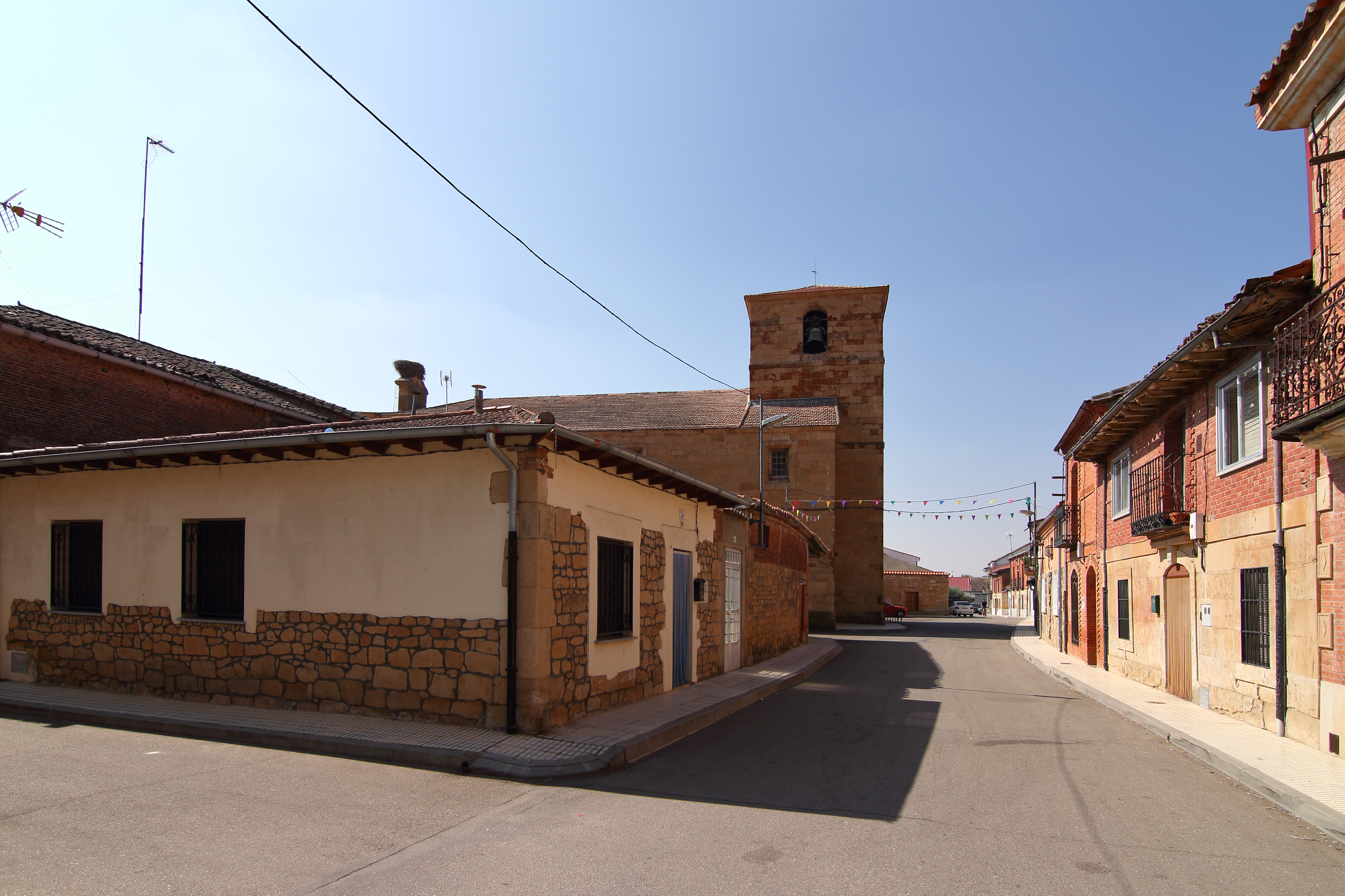 Calle Mayor de La Vellés